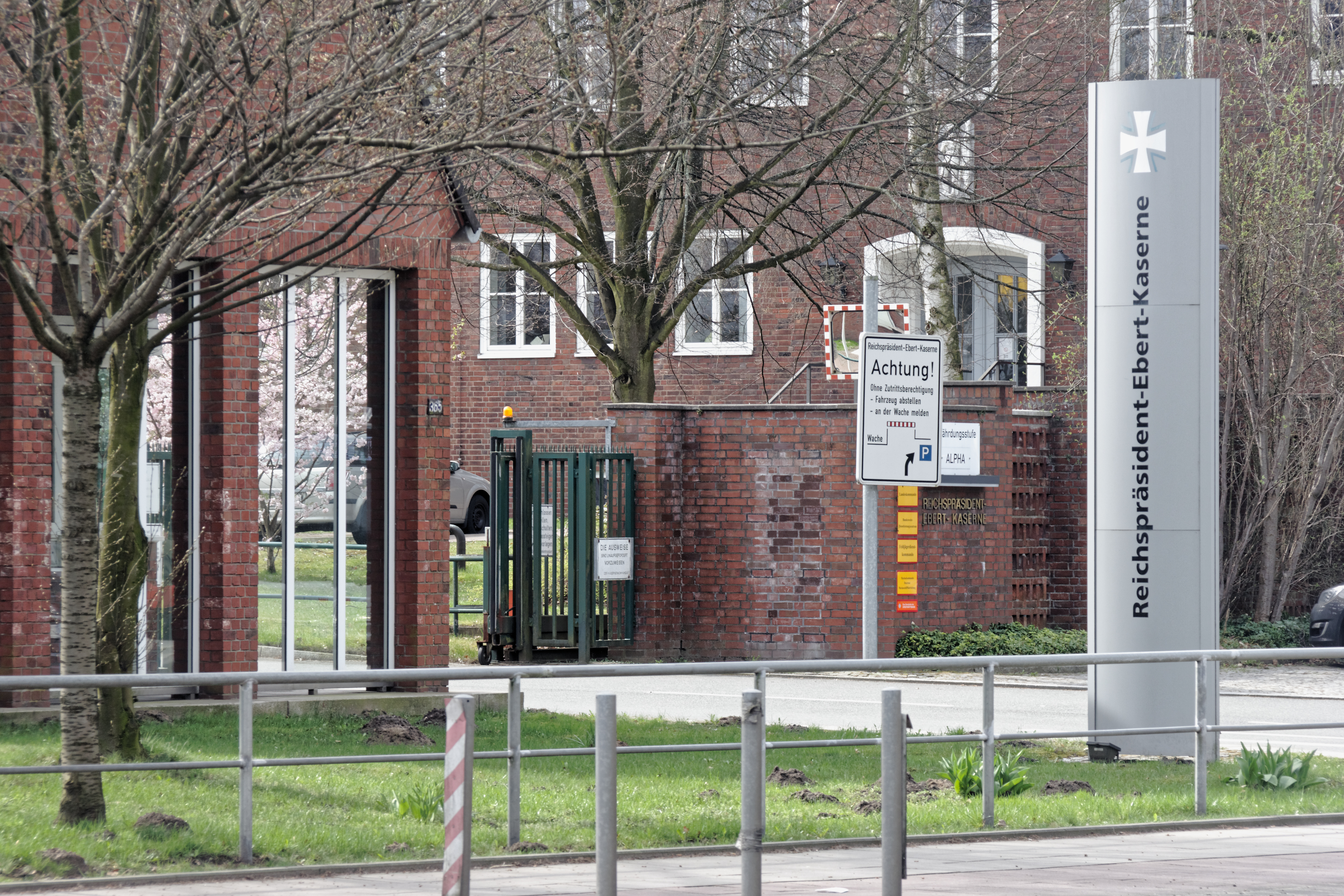 Hamburg-Iserbrook, Reichspräsident-Ebert-Kaserne, HaupttorThis is a photograph of an architectural monument.